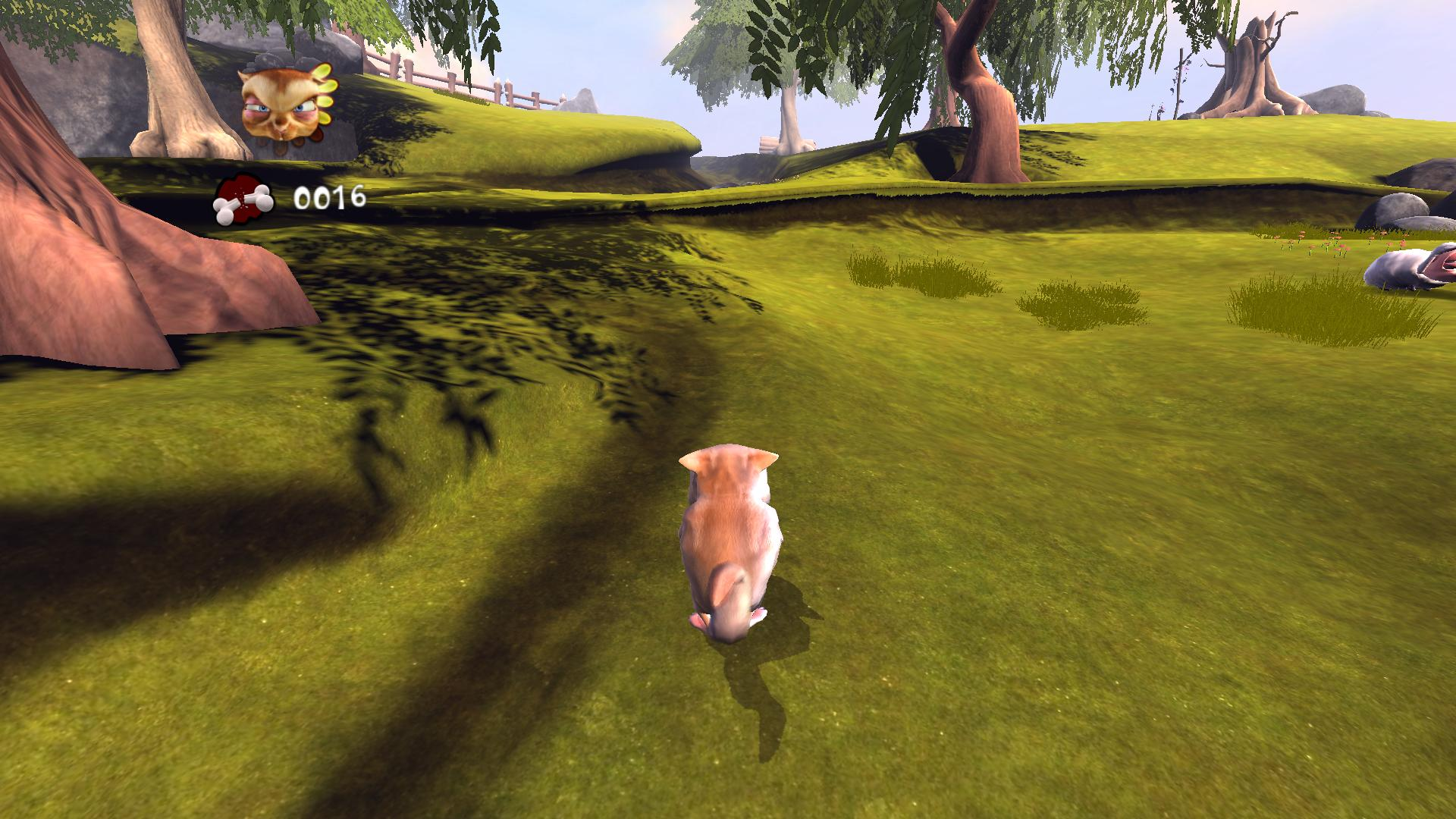 Česky: Screenshot z Yo Frankie!